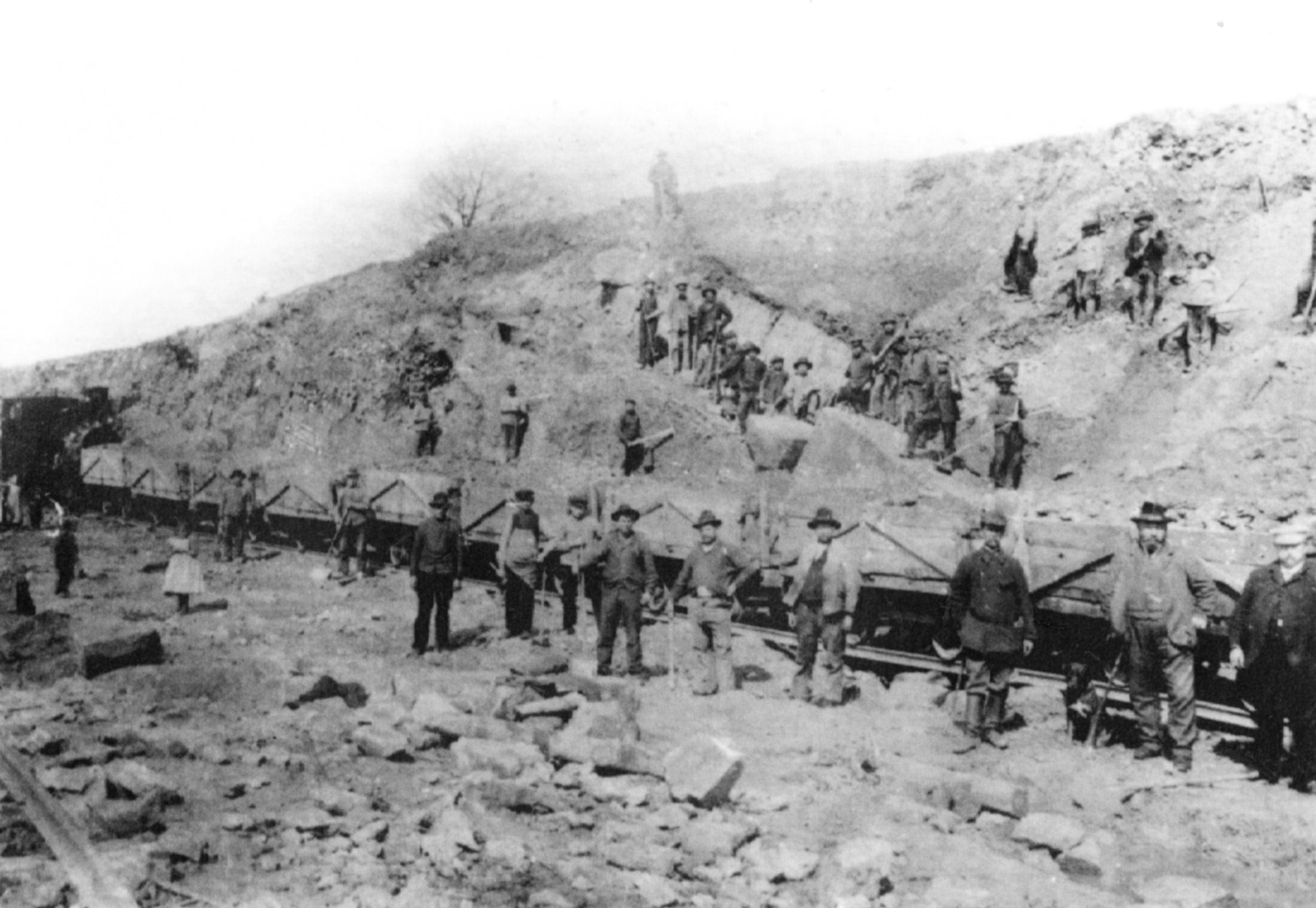 Gleisbauarbeiter bei Gildehaus beim Durchstich durch den Bentheimer Sandstein zum Bau der Bahnstrecke Bentheim–Gronau.